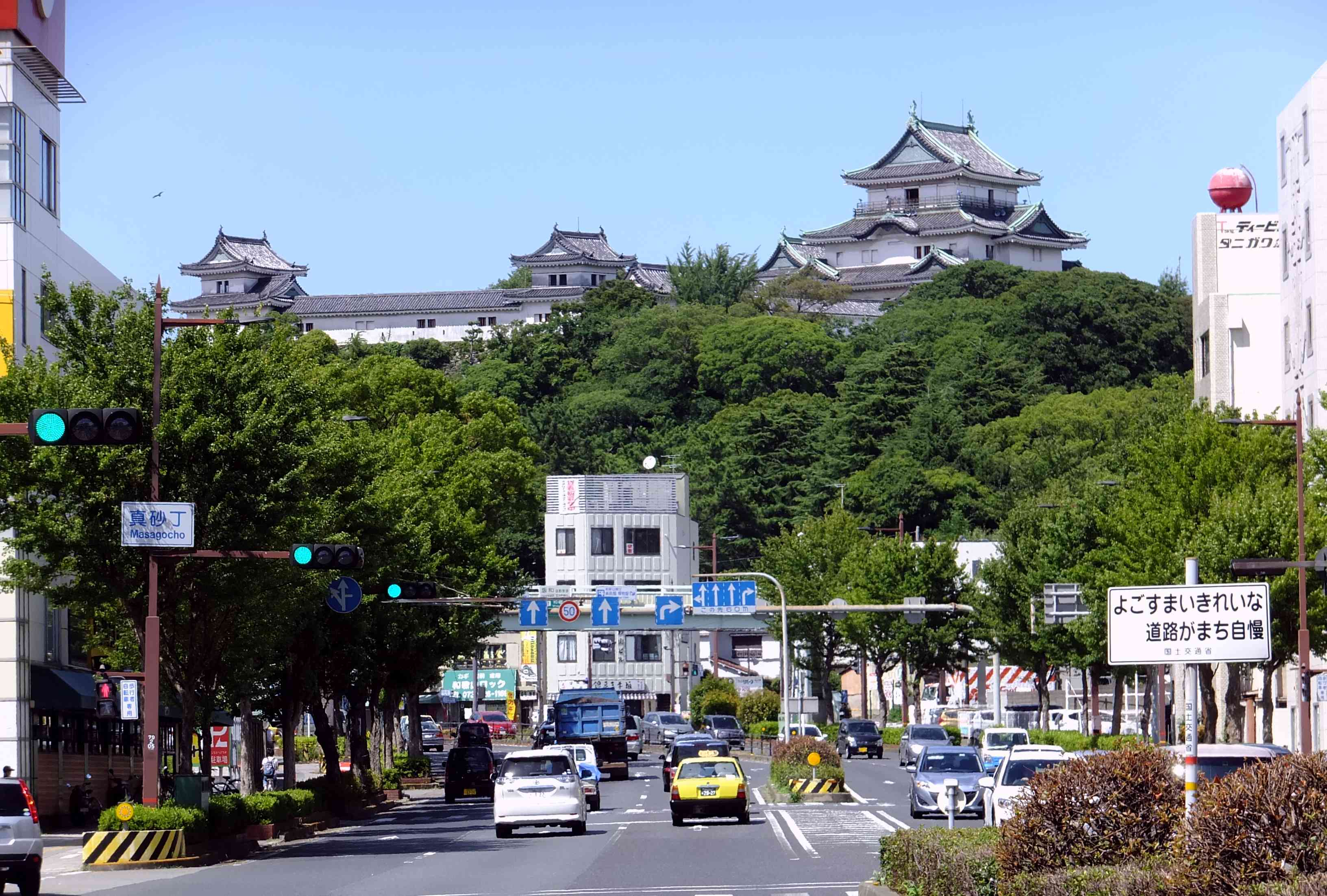 和歌山城を望む国道42号